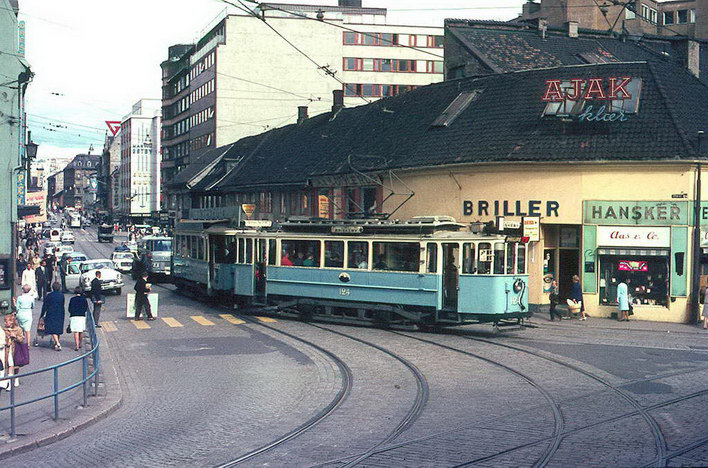 Oslo Sporveier. Trikk motorvogn 124 type HaWa linje 1 svinger ut av Storgata ved Kirkeristen. Brille- og hanskebutikk, butikkskilt.